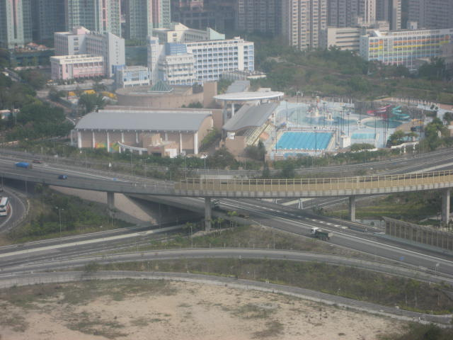 將軍澳 - 將軍澳新市鎮